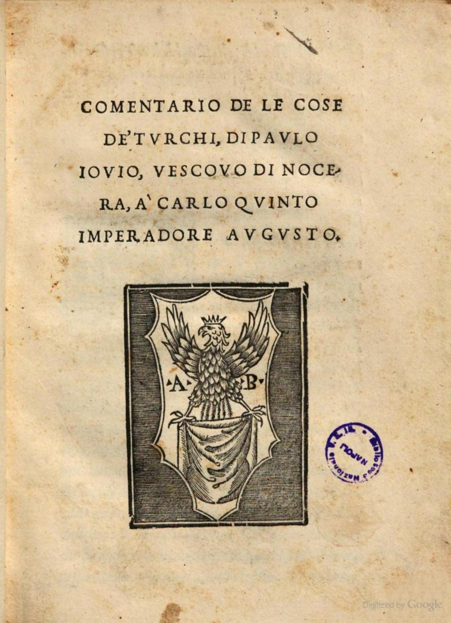 Paulus Iovius, Comentario_de_le_cose_de_Turchi (1535 ed.) title page